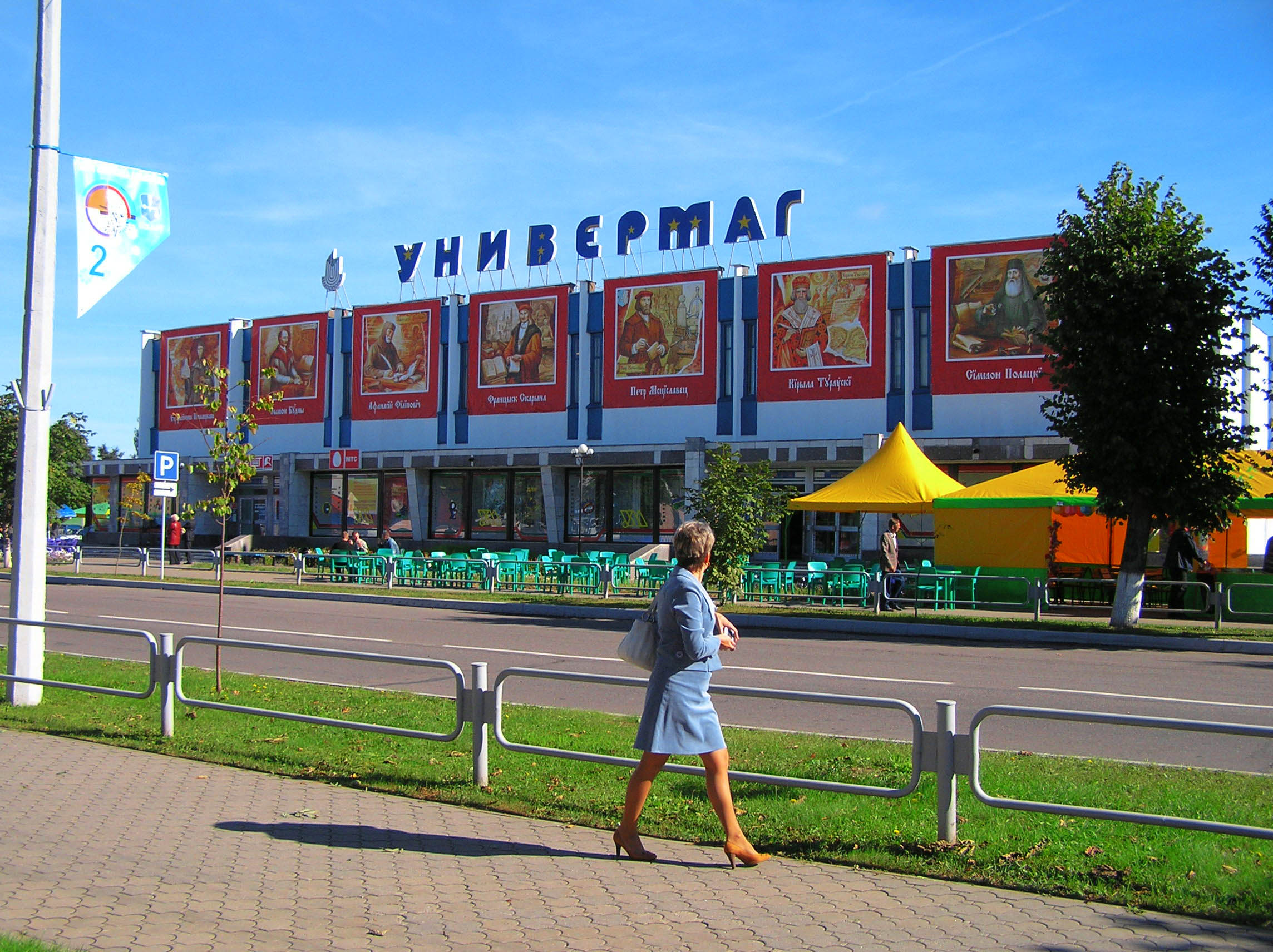 Беларуская (тарашкевіца): ДБП 2007, Шклоў